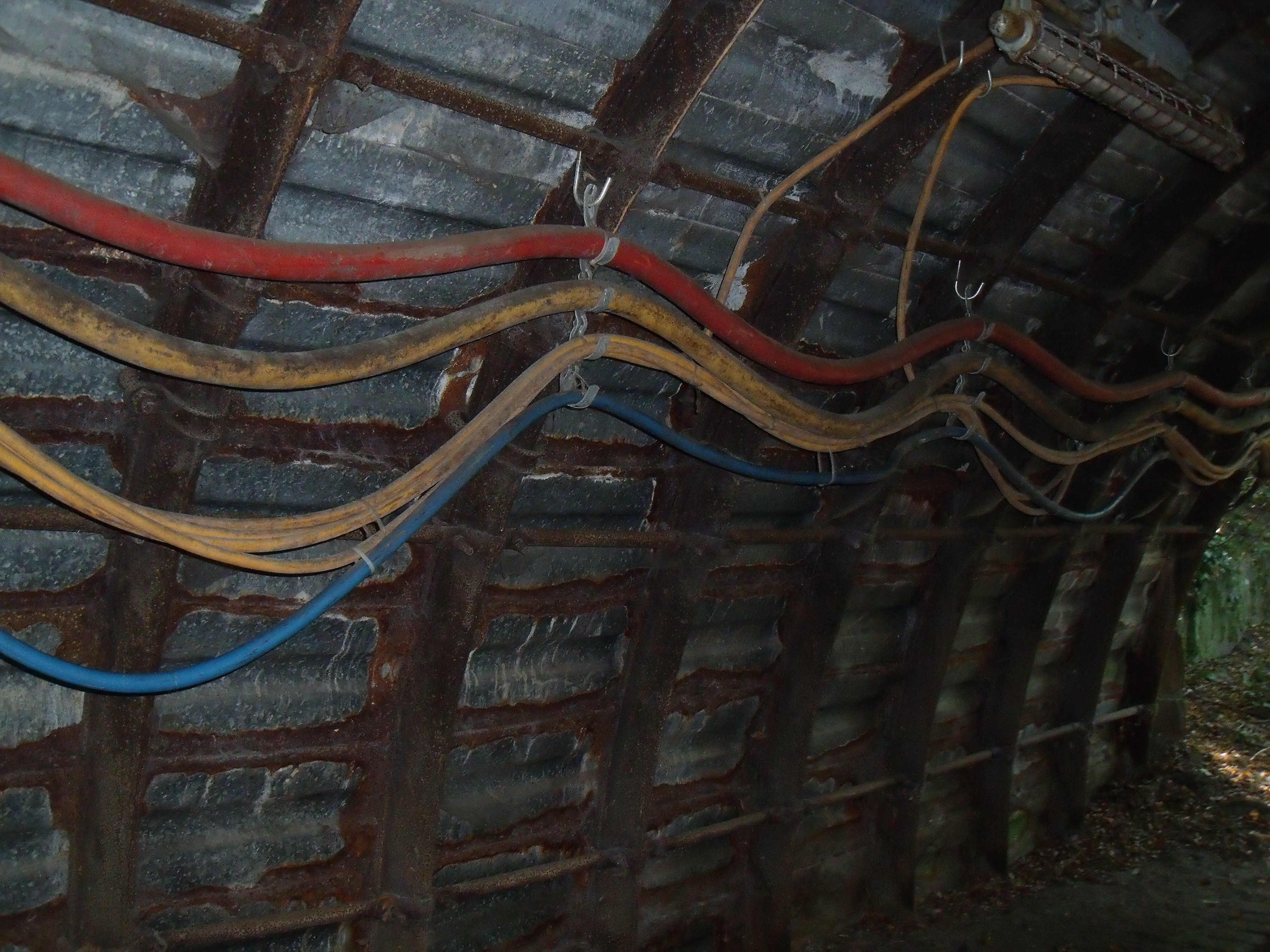 Gleitbogenausbau mit Blick auf die Reibungsschlösser